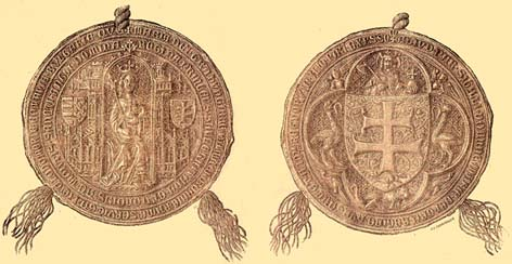 Marie Uherská